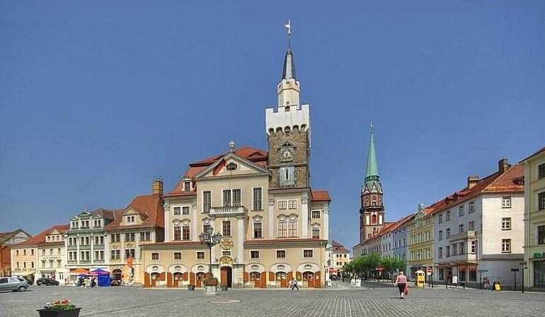 Löbau, Altmarkt und Nicolaistraße